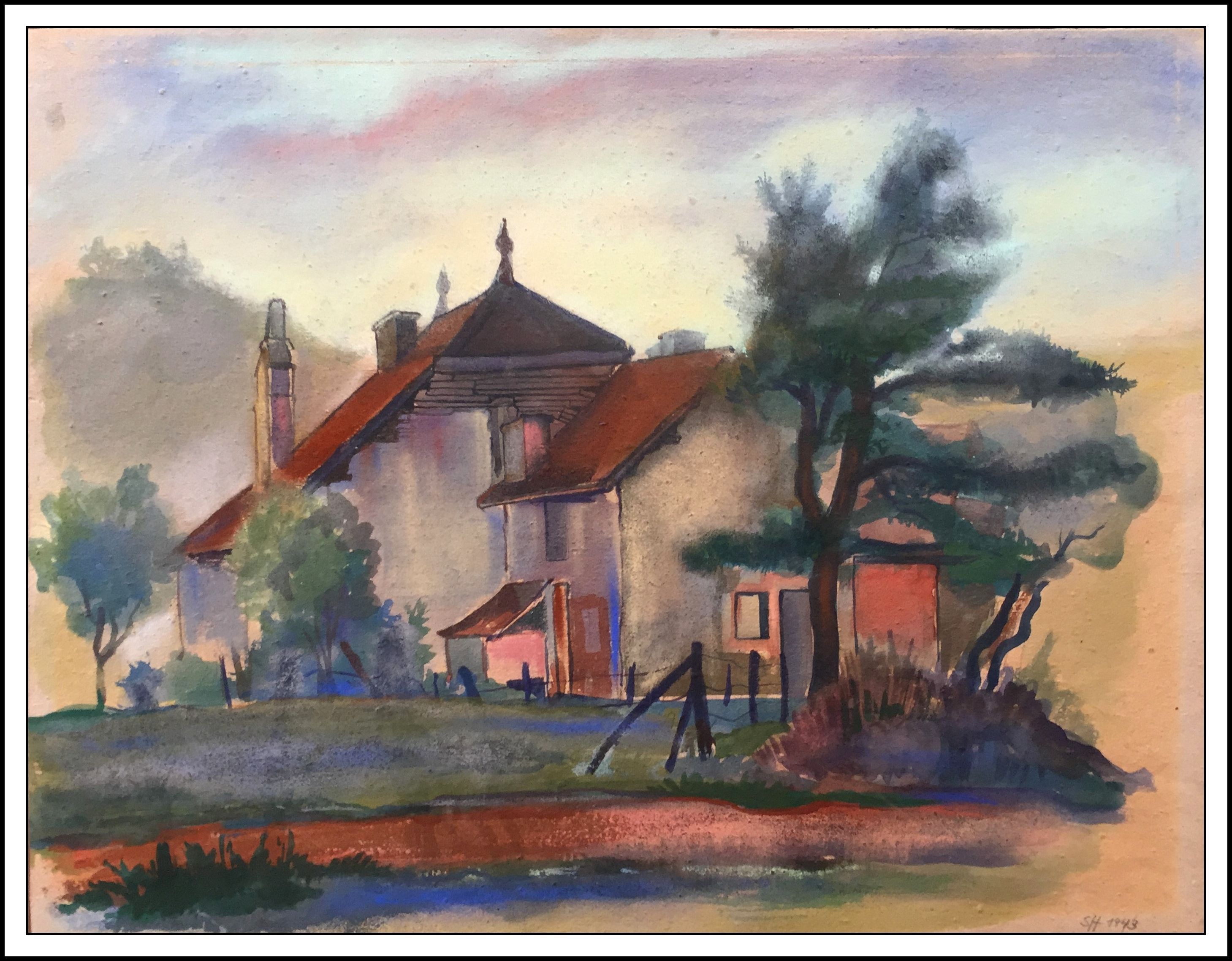 Pastell Wasserfarbe auf Papier 39 cm x 50,5 cm